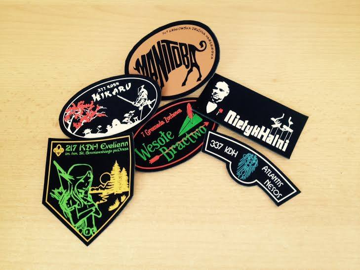 Plakietki jednostek Szczepu Halny